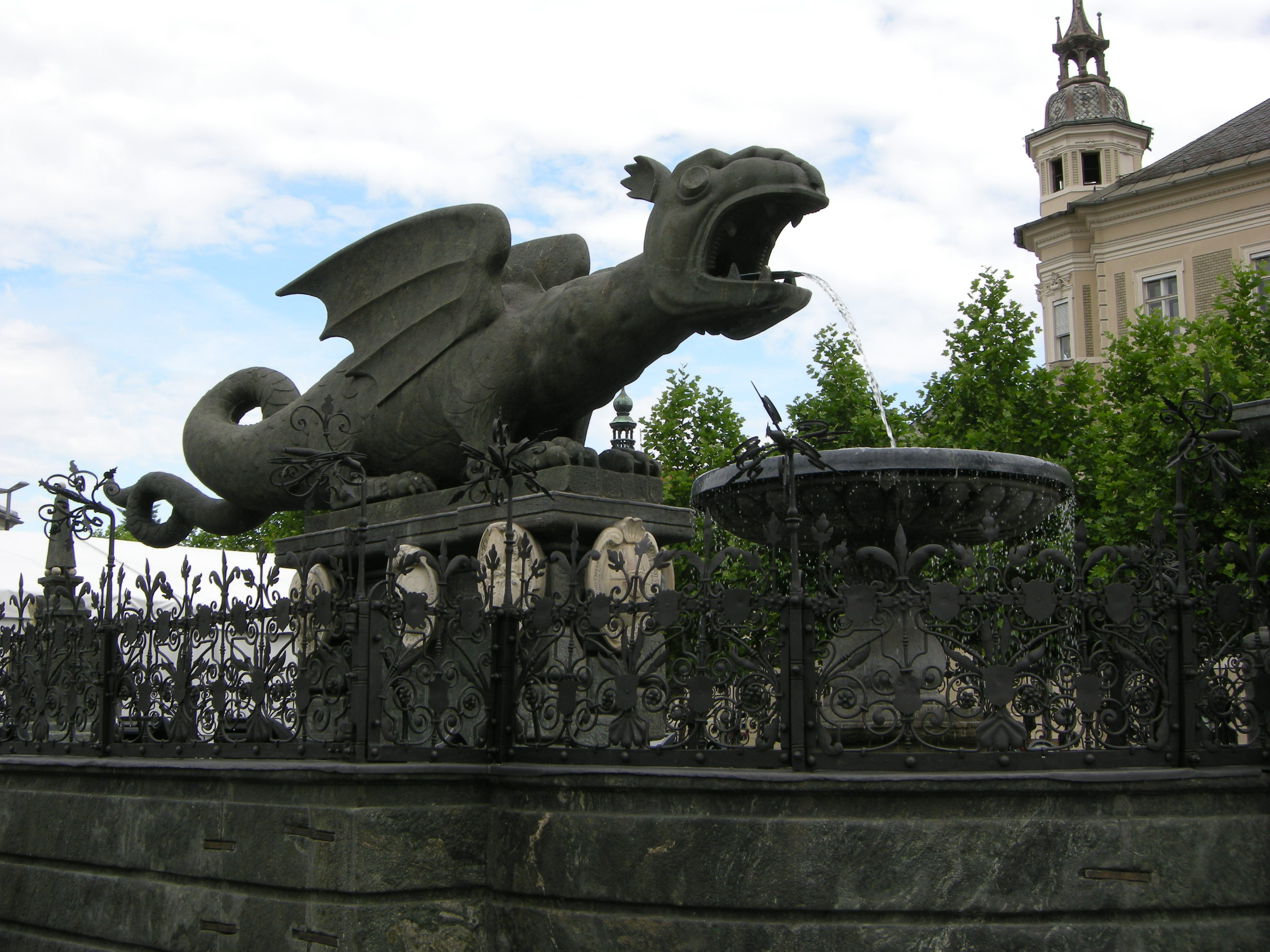 Lindwurmbrunnen